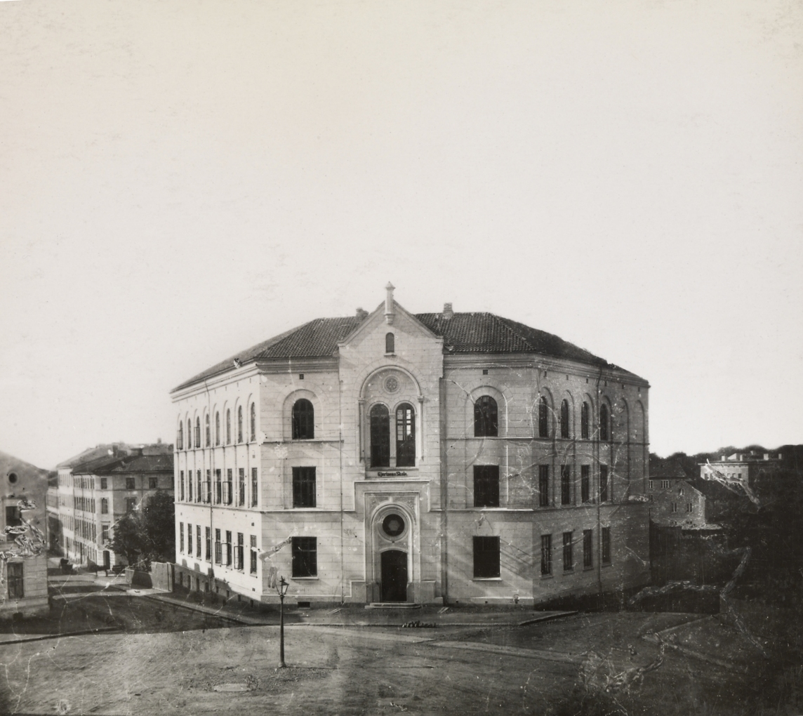 Gjertsens skole ved St Olavs plass i Oslo, mellom Universitetsgata til venstre og St. Olavs gate til høyre